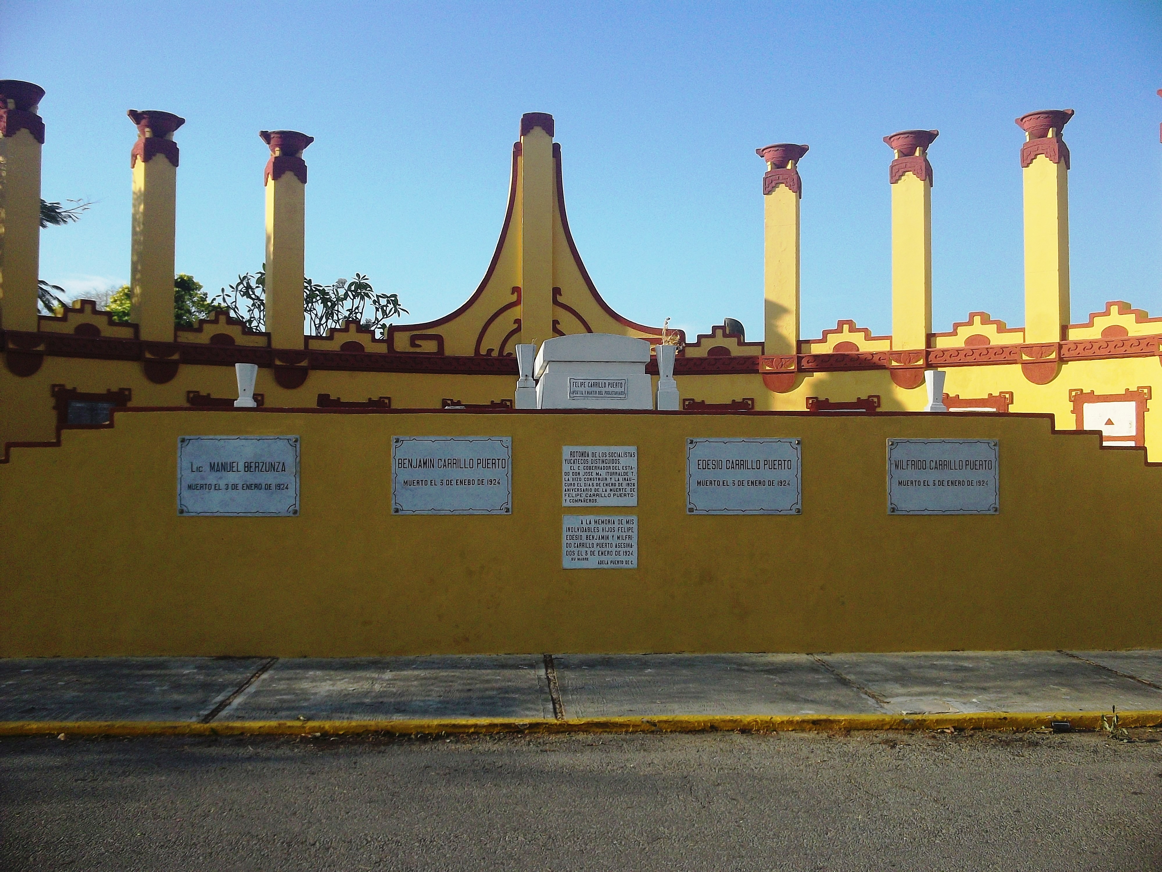 Monumento a Felipe Carrillo Puerto, Cementerio General, Mérida, Yucatán.